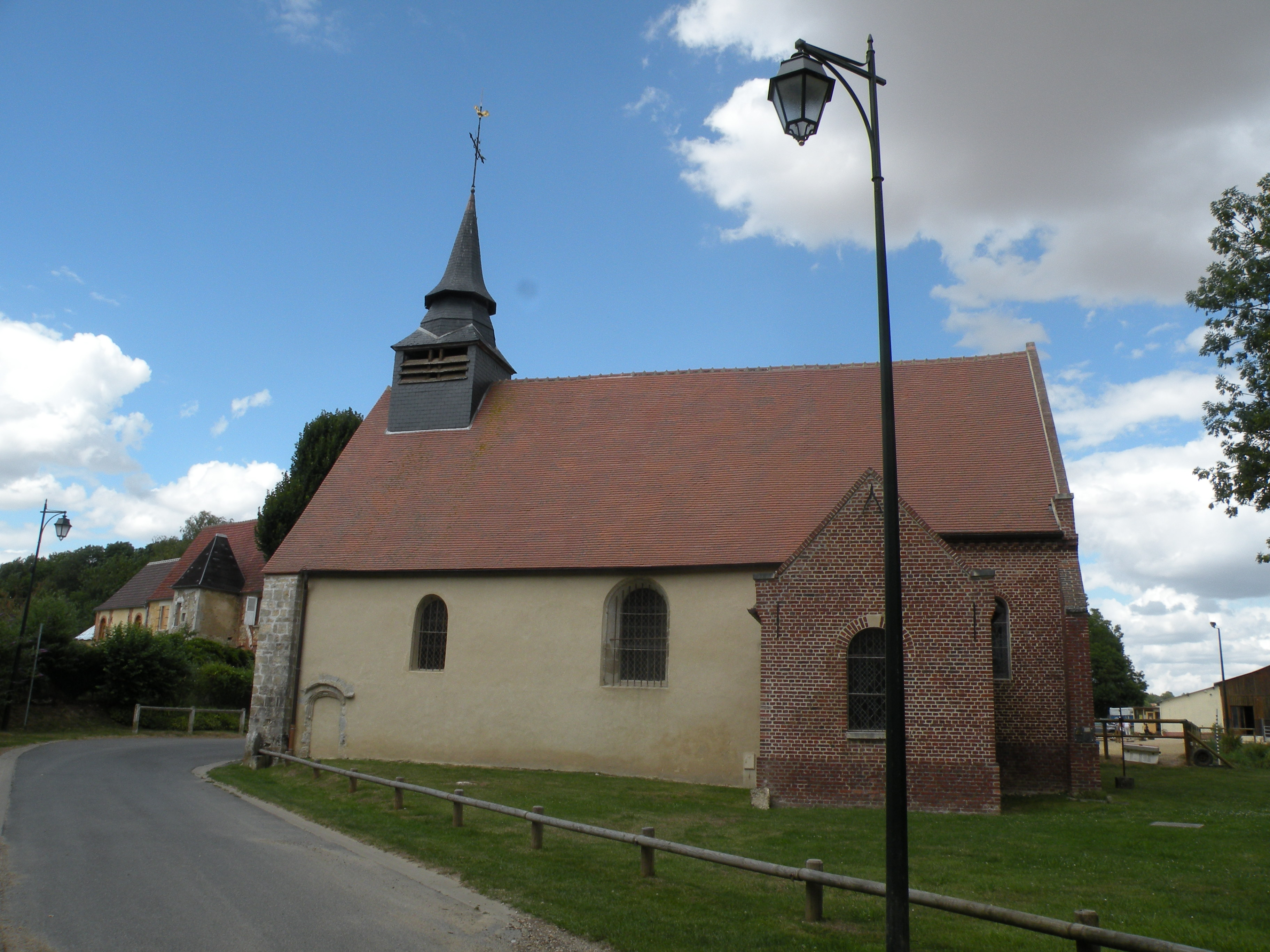 église de Pouilly (Oise)